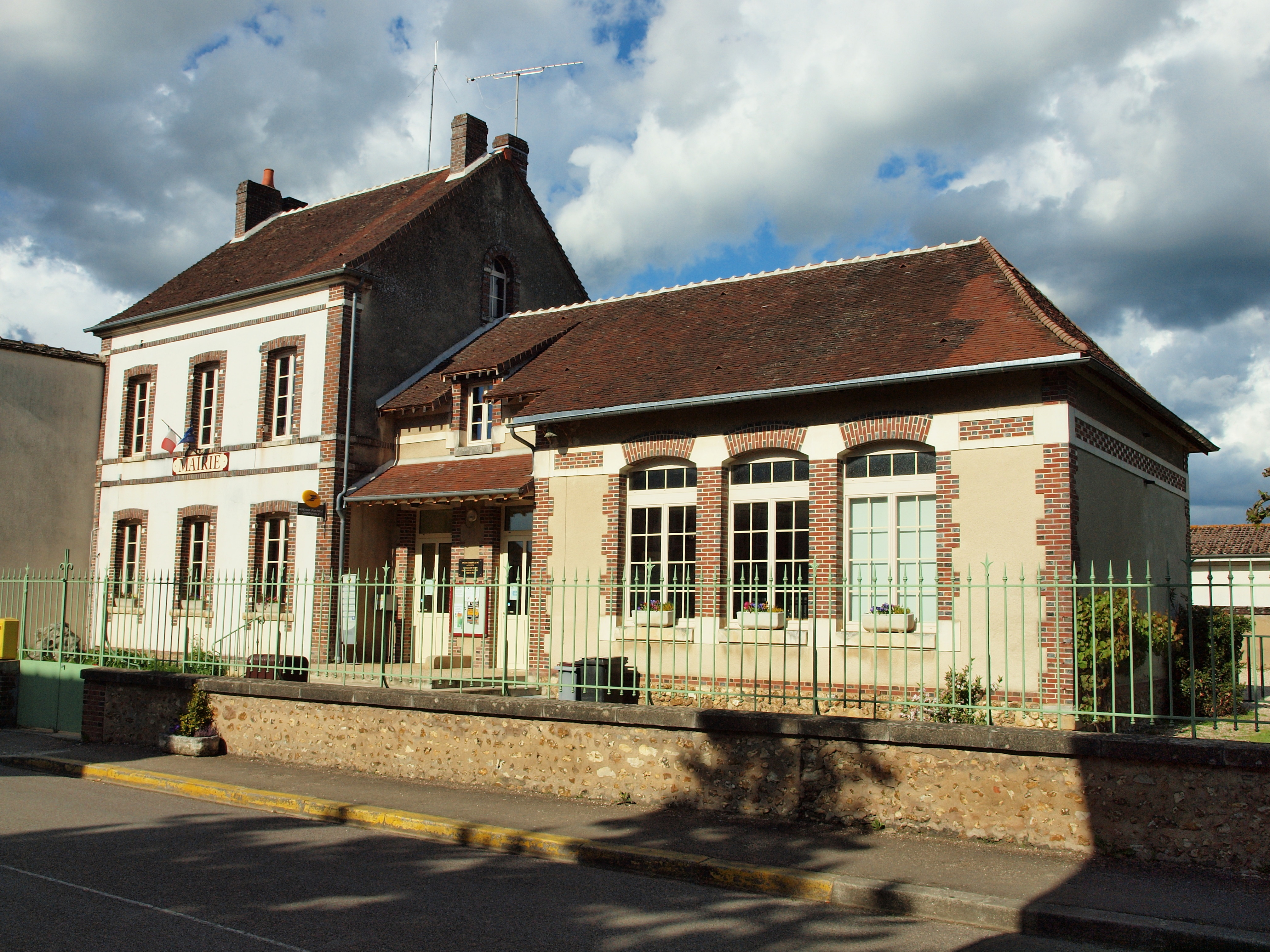 Mairie de Sépeaux (Yonne, France)